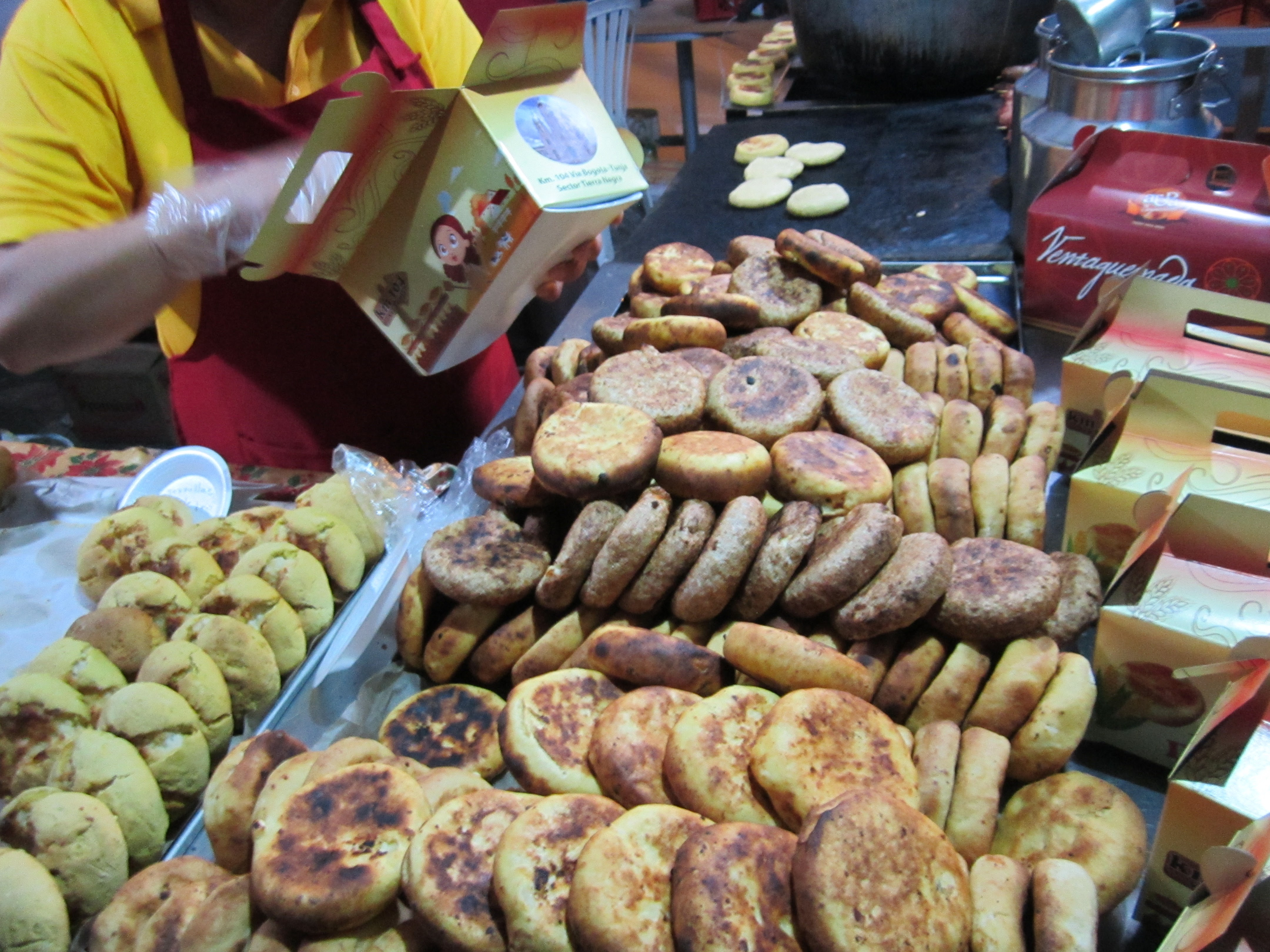 Arepa Boyacense de Colombia